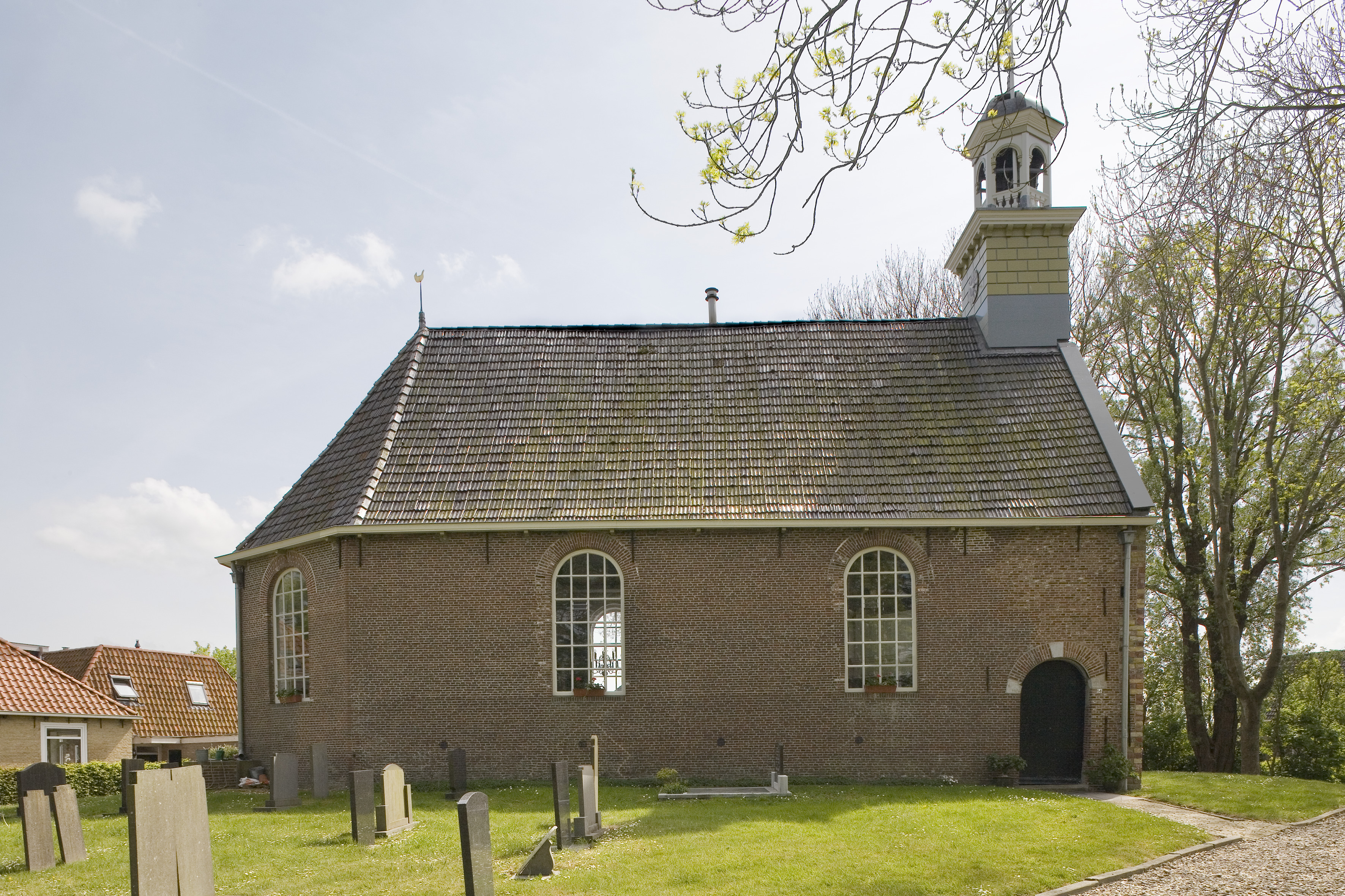 Nederlands Hervormde Kerk: Overzicht van de noordgevel met dakruiter, kerkhof op de voorgrond